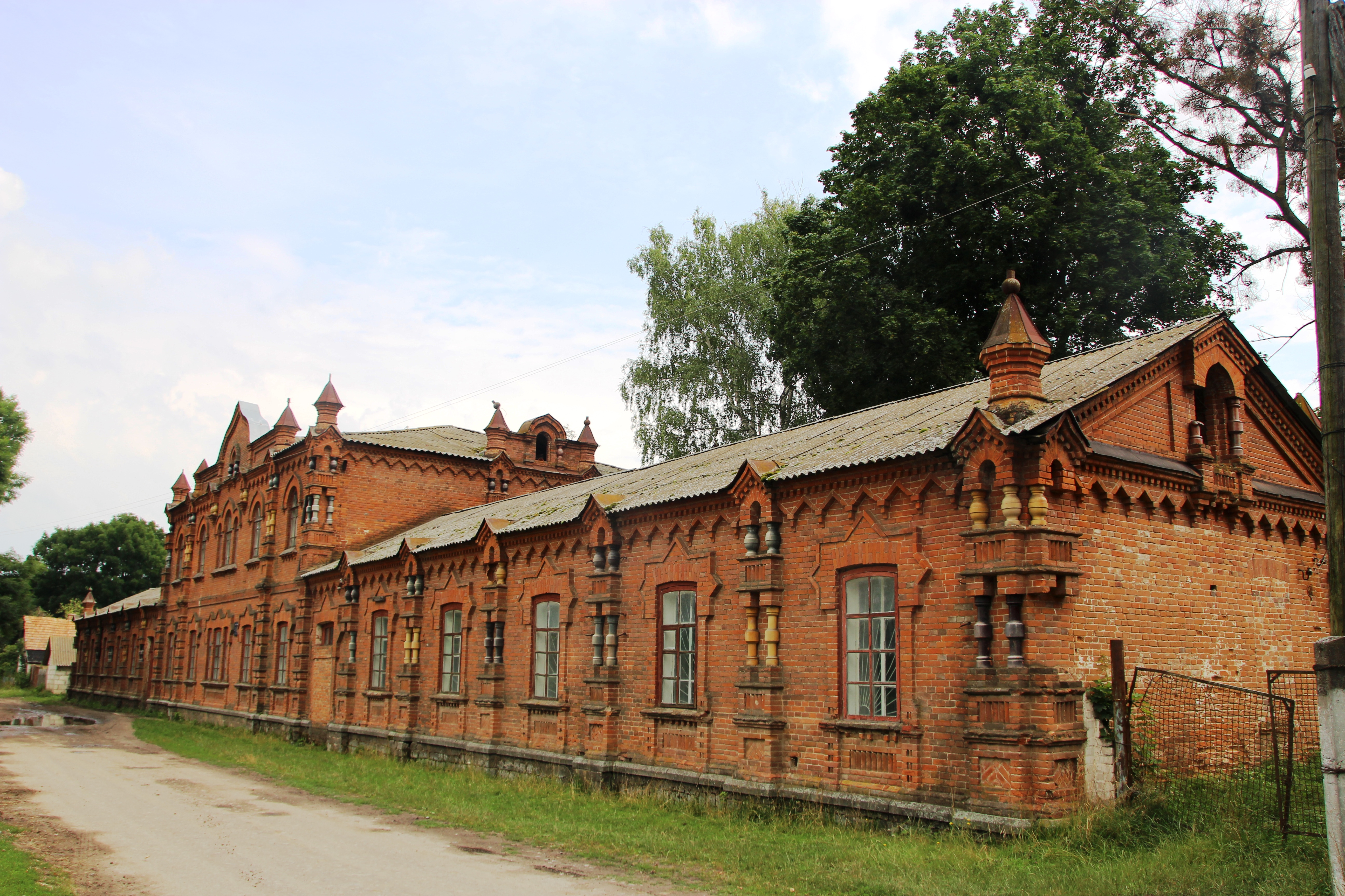 Село Волокитине Путивльський район Садиба Миклашевських